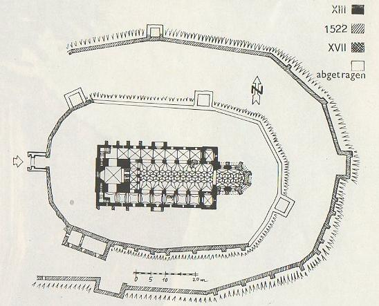 Planul fortificatiei din Cincu.